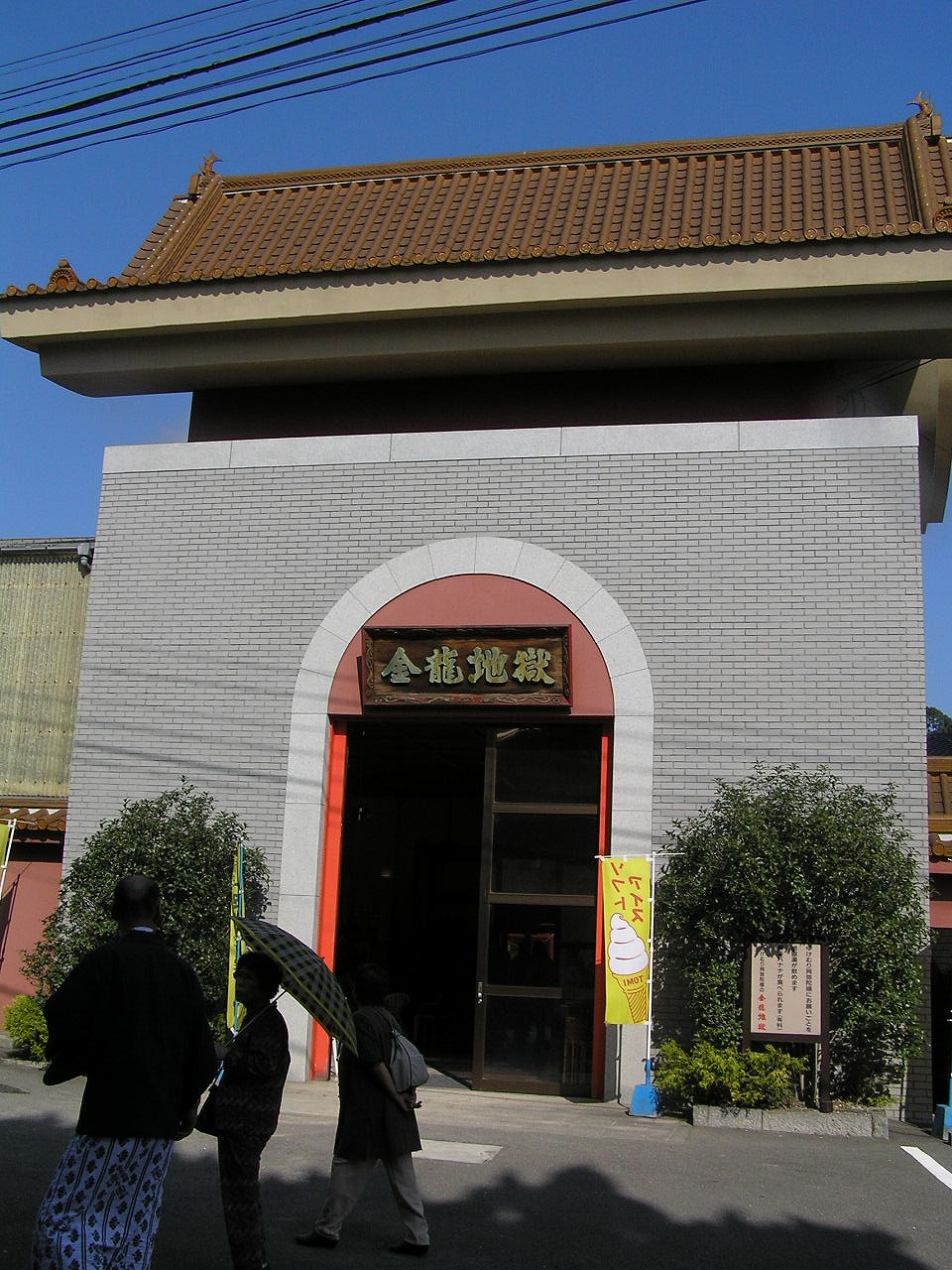 金龍地獄